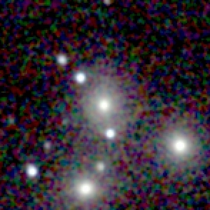 Galaxy NGC 70